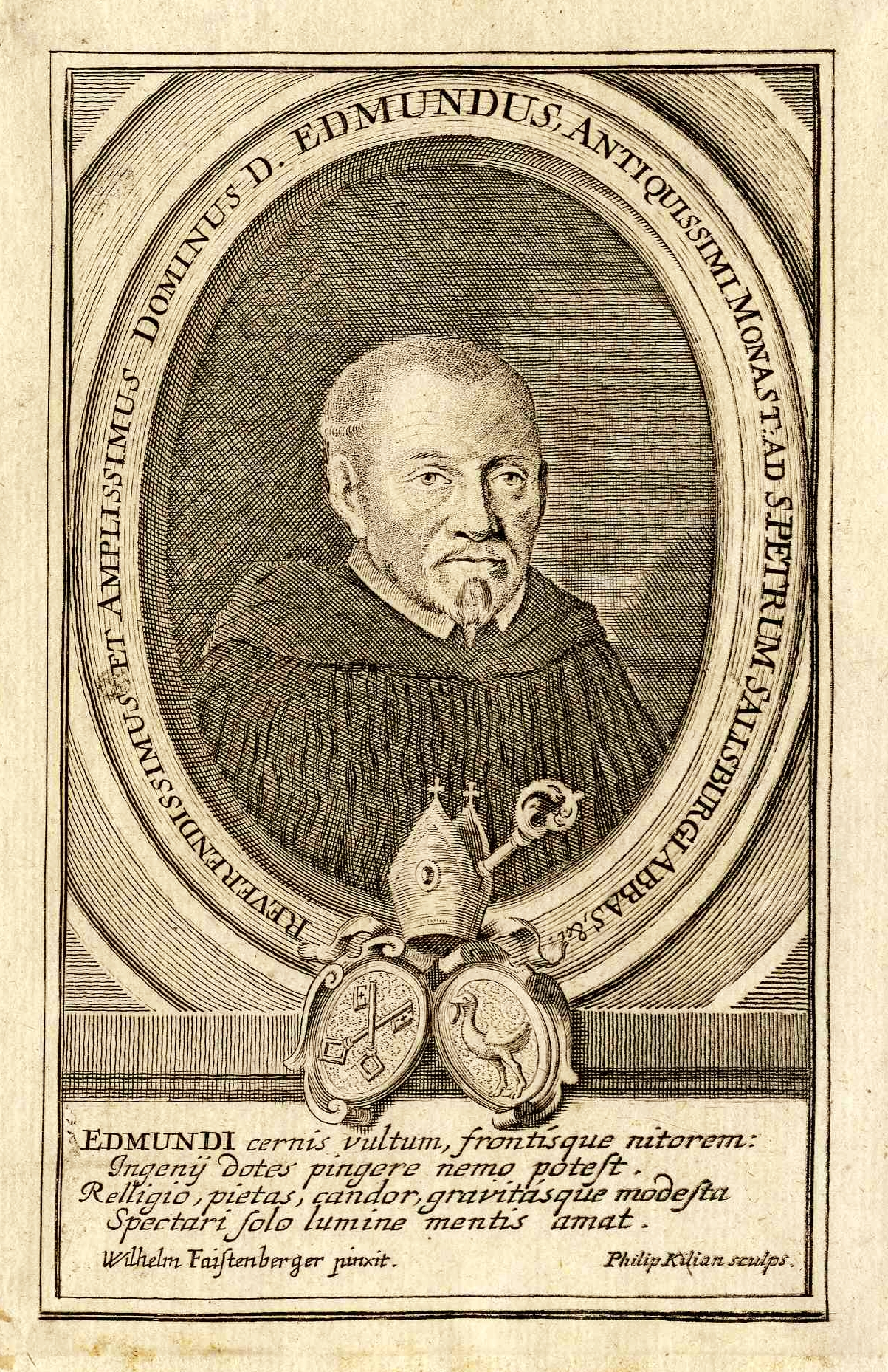 Edmund I. Sinnhuber (1631–1702), 1673–1702 Abt des Stifts St. Peter in Salzburg